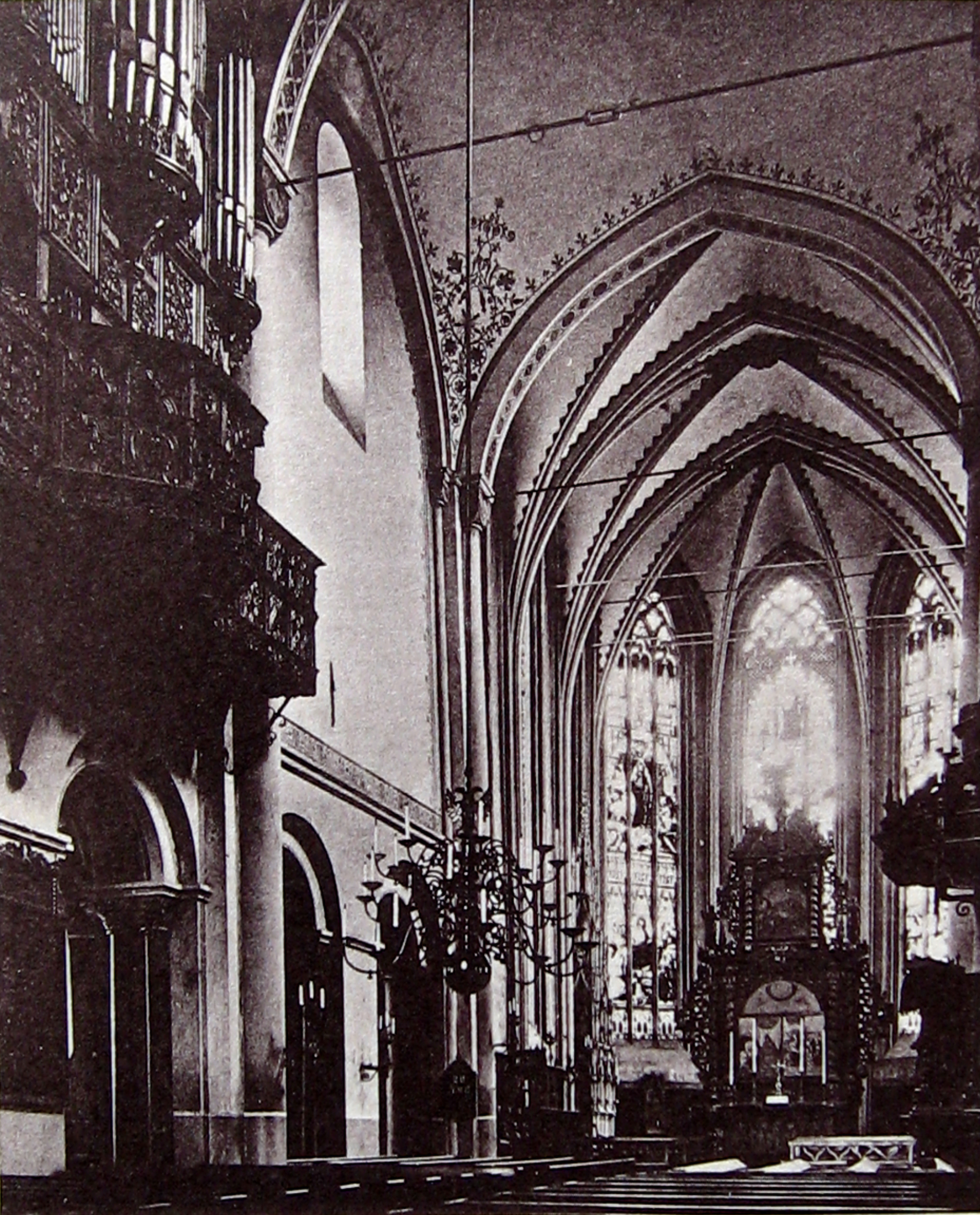 Marienkirche Dortmund 1890, Innenraum